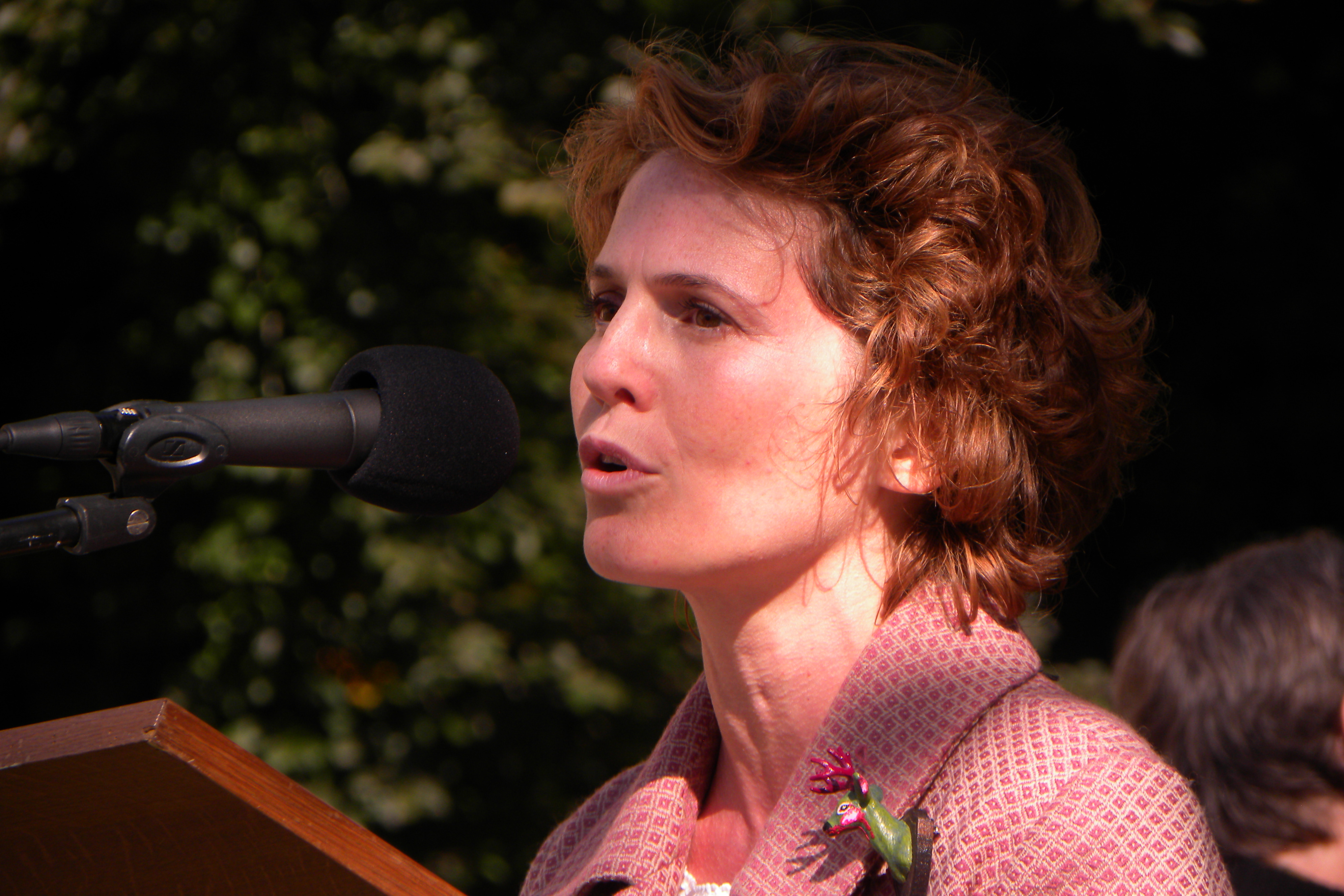 La comédienne et artiste Maureen Dor le 30 sept. 2012.